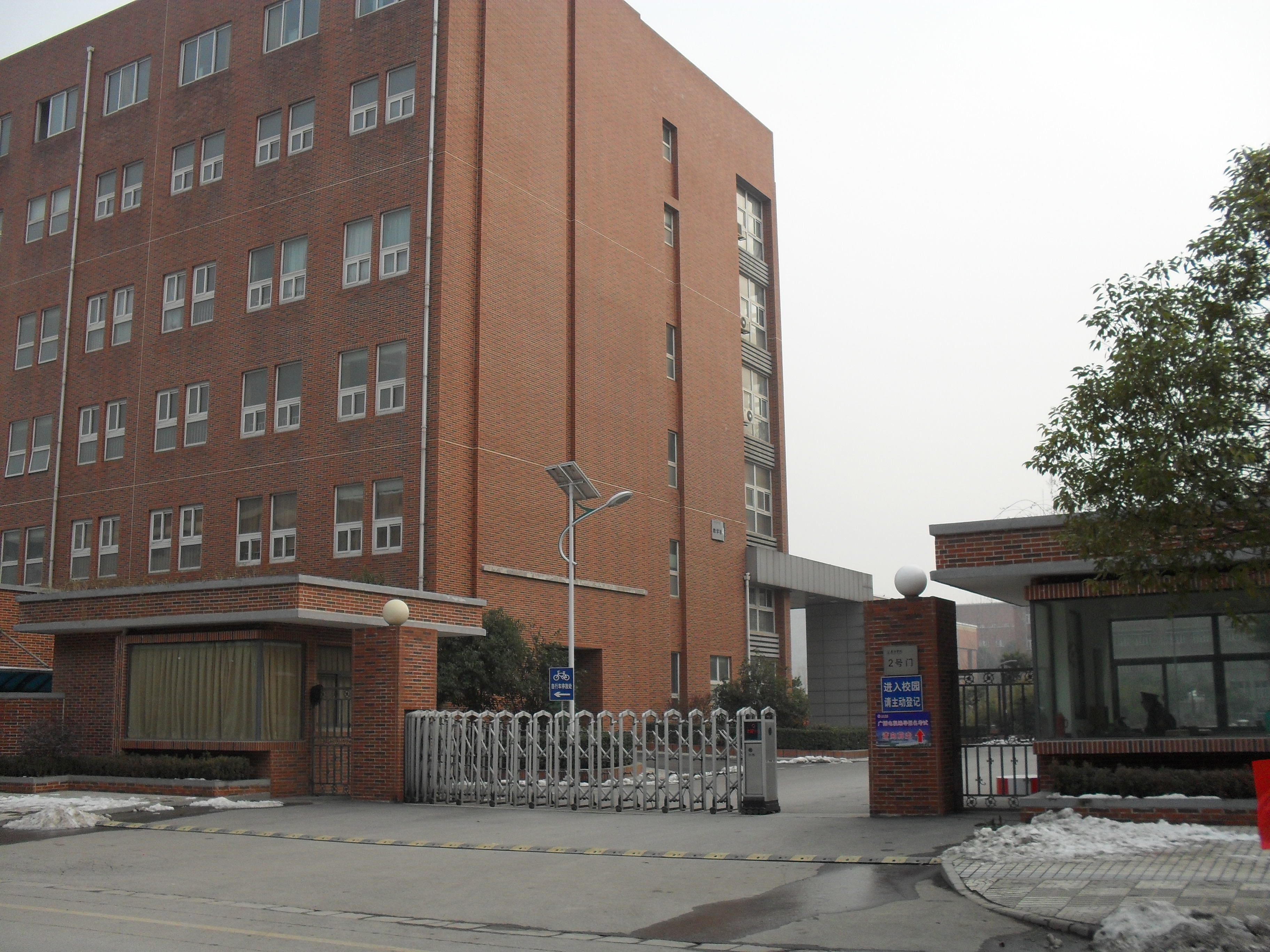 南京铁心桥春晓路三江学院北门